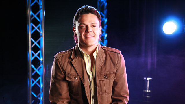 Visitar para ver una entrevista exclusiva con Pedro Fernández.